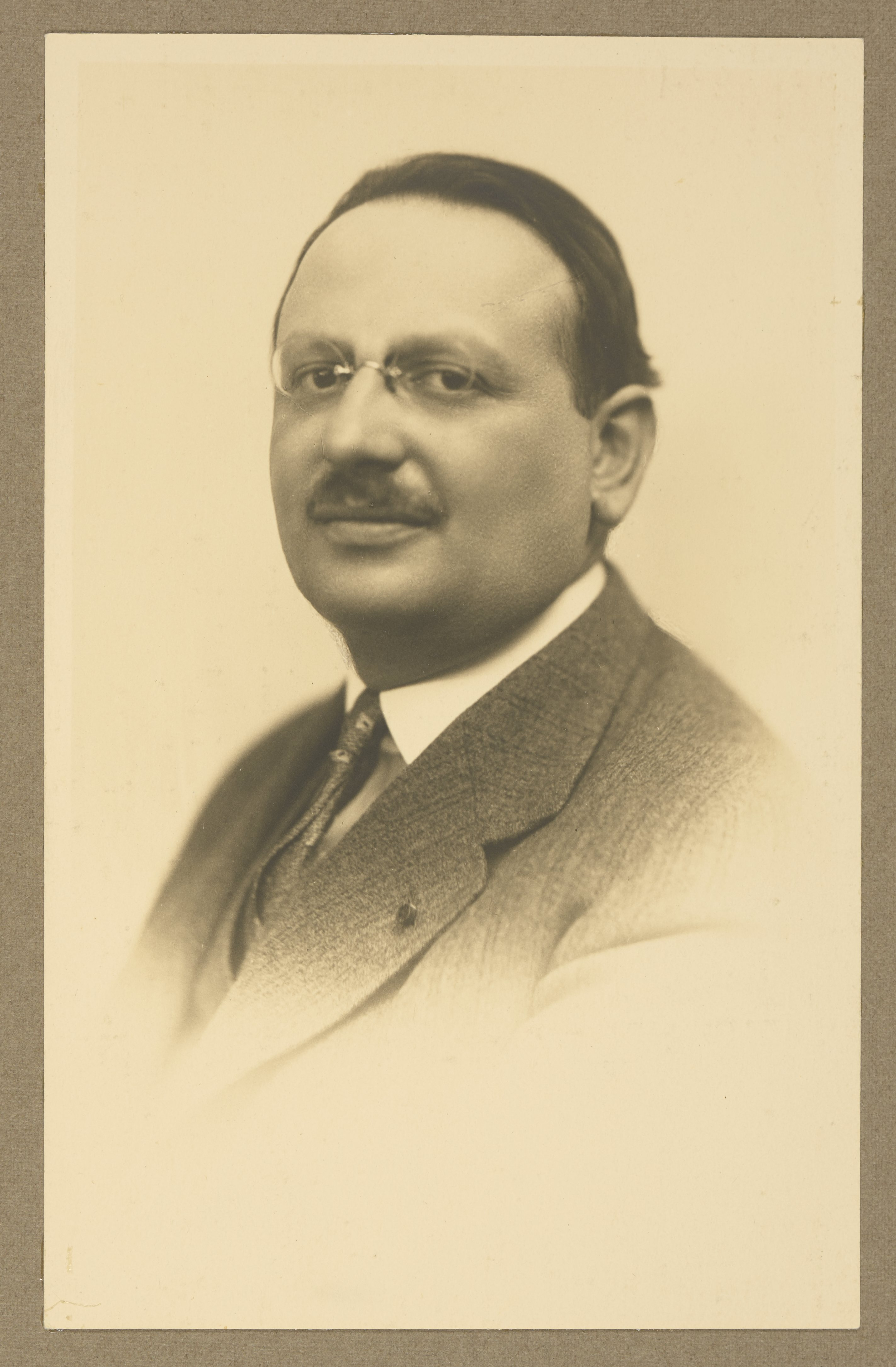 Ludwik Rubel